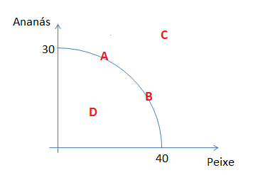 tipos de pontos na FPP